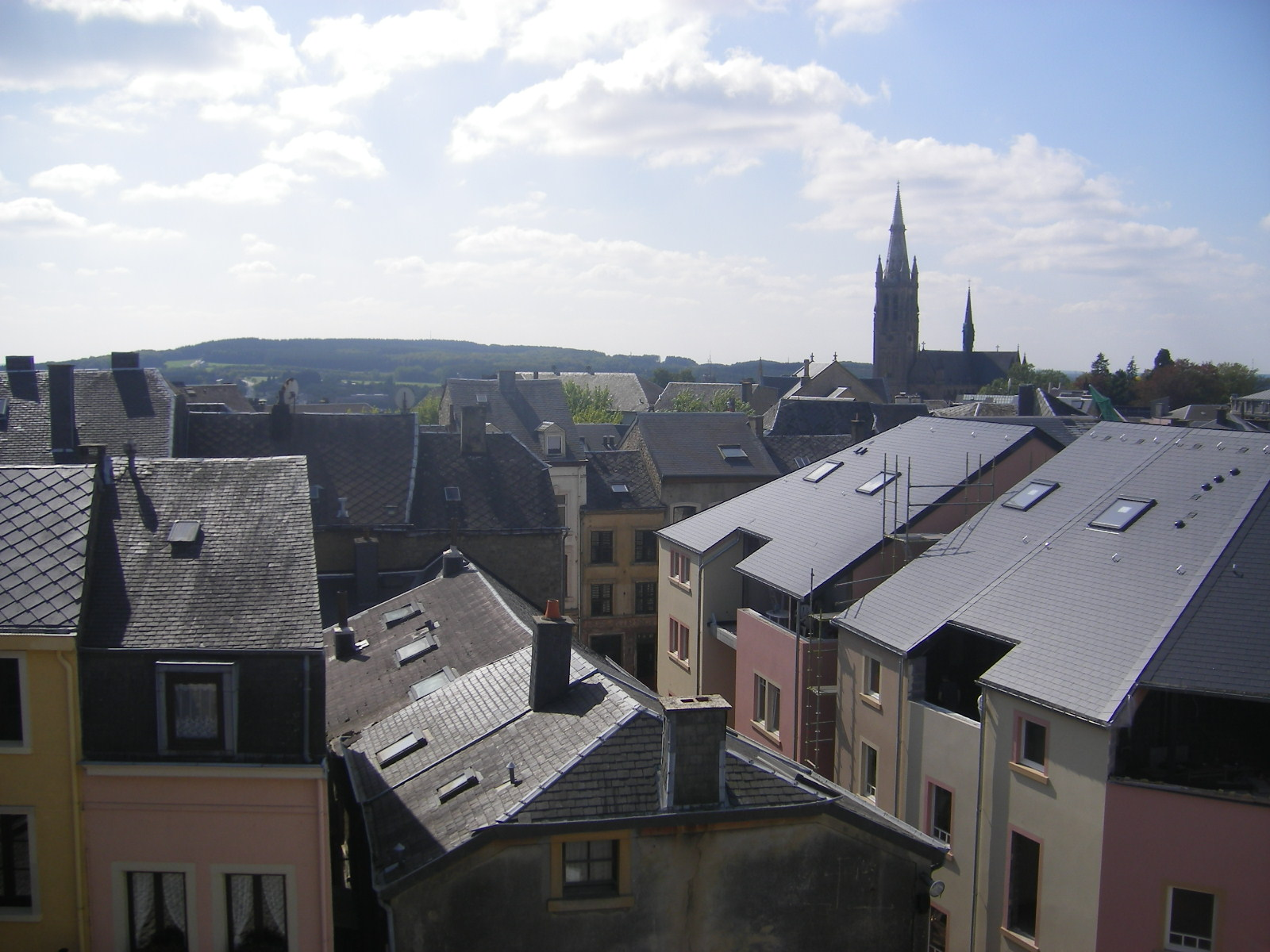 Arlon